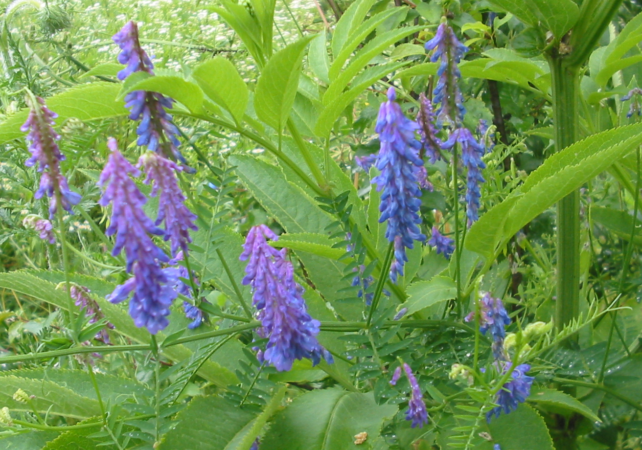 Vicia cracca